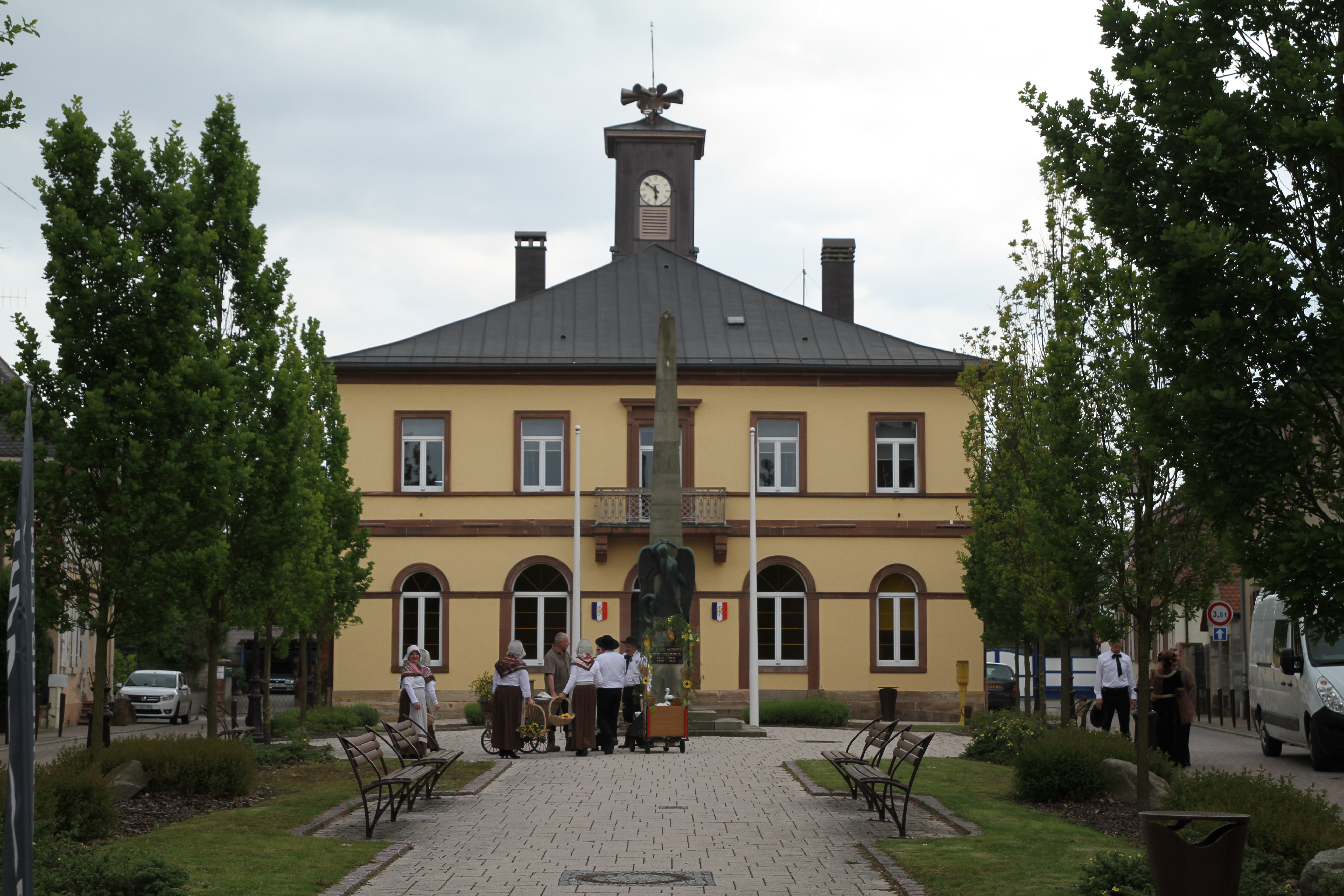 Gebäude des Gemeindeverband Seltz-Delta-Sauer in Seltz.